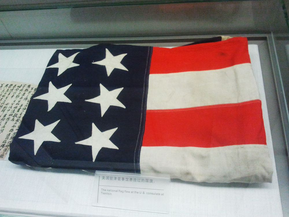 天津博物馆藏，美国驻津领事馆悬挂过的国旗